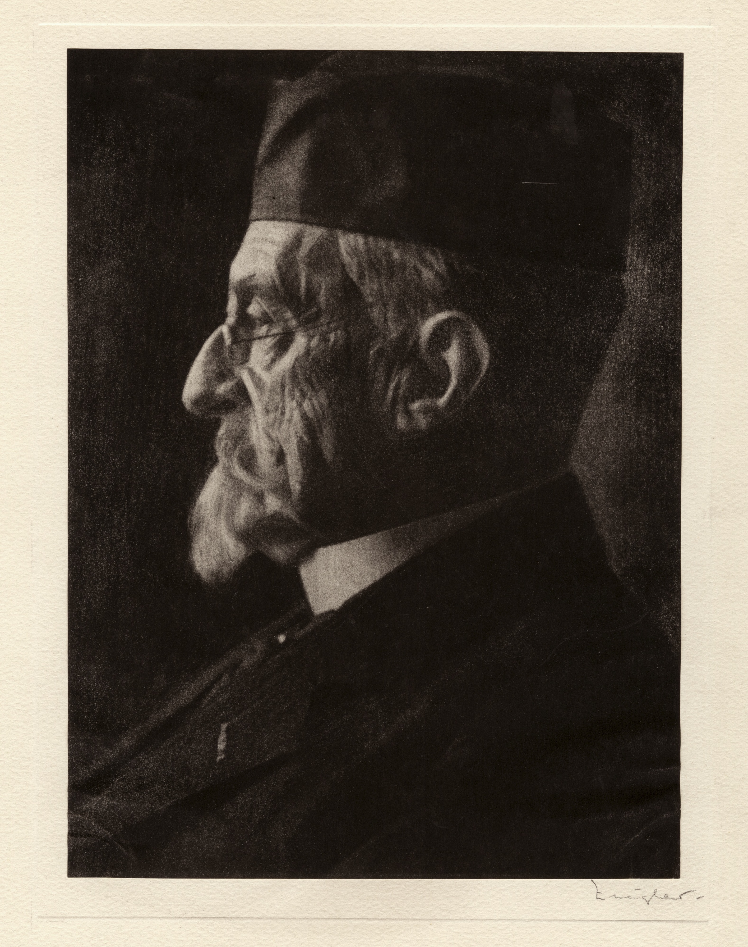 Krämer, Frederik Jan Louis (1850-01-03 - 1928-05-02) Prof. dr. F.J.L. Krämer, historicus en hoogleraar geschiedenis in Utrecht, was docent geschiedenis van de jonge koningin Wilhelmina. In 1903 werd Krämer directeur van het Koninklijk Huisarchief, een functie die hij tot zijn dood in 1928 zou vervullen. Dit profielportret is kort voor zijn overlijden vervaardigd door fotograaf Franz Ziegler in een bijzondere fototechniek. Het gaat hier om een zogenaamd edel procedé: een directe kooldruk op Fressonpapier. Ziegler was van 1928 tot in 1939 regelmatig werkzaam voor het hof. Vervaardiger fotograaf Ziegler, F. (1893-1939) Datering 1927 / 2-5-1928 Beschrijving Portret van prof. dr. F.J.L. Krämer, docent geschiedenis van koningin Wilhelmina en directeur van het Koninklijk Huisarchief 1903-1928; kop en schouders en profil naar links. Met huismuts, bril, sikje, opstaande witte boord, donkere jas, onderscheiding op de revers. Fysieke kenmerken techniek kooldruk drager materiaal papier hoogte 43,9 cm breedte 34,0 cm beeld hoogte 29,5 cm breedte 22,0 cm Objectgegevens objectnummer FO/0000208 collectie fotografie objectcategorie fotografie objectnaam foto